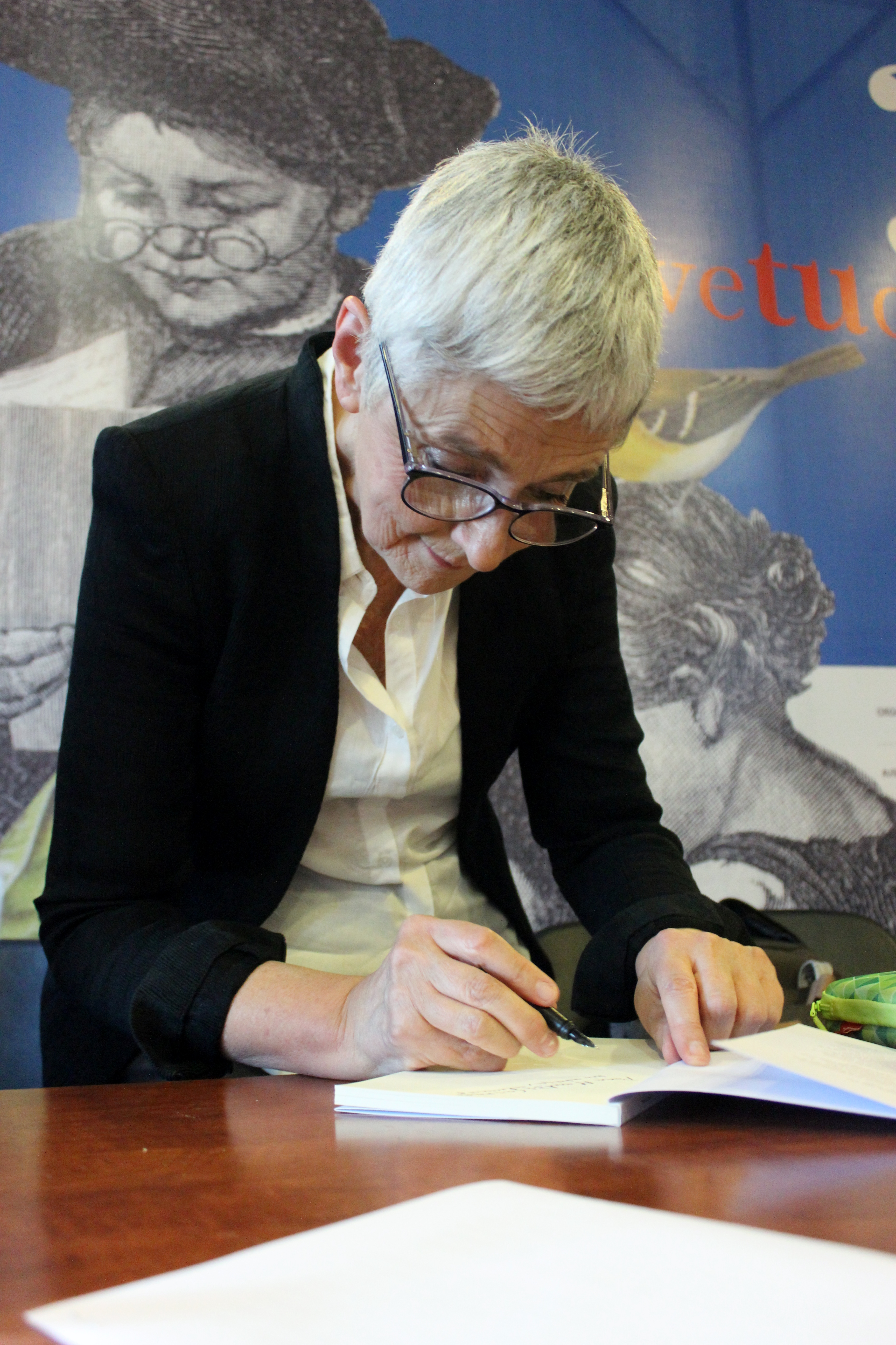 La escritora chilena Ana María del Río durante la presentación de su novela Siete días (reedición corregida de Siete días de la señora K) realizada en la Feria Internacional del Libro de Santiago 2018 (sala Acario Cotapos, 7 de noviembre).